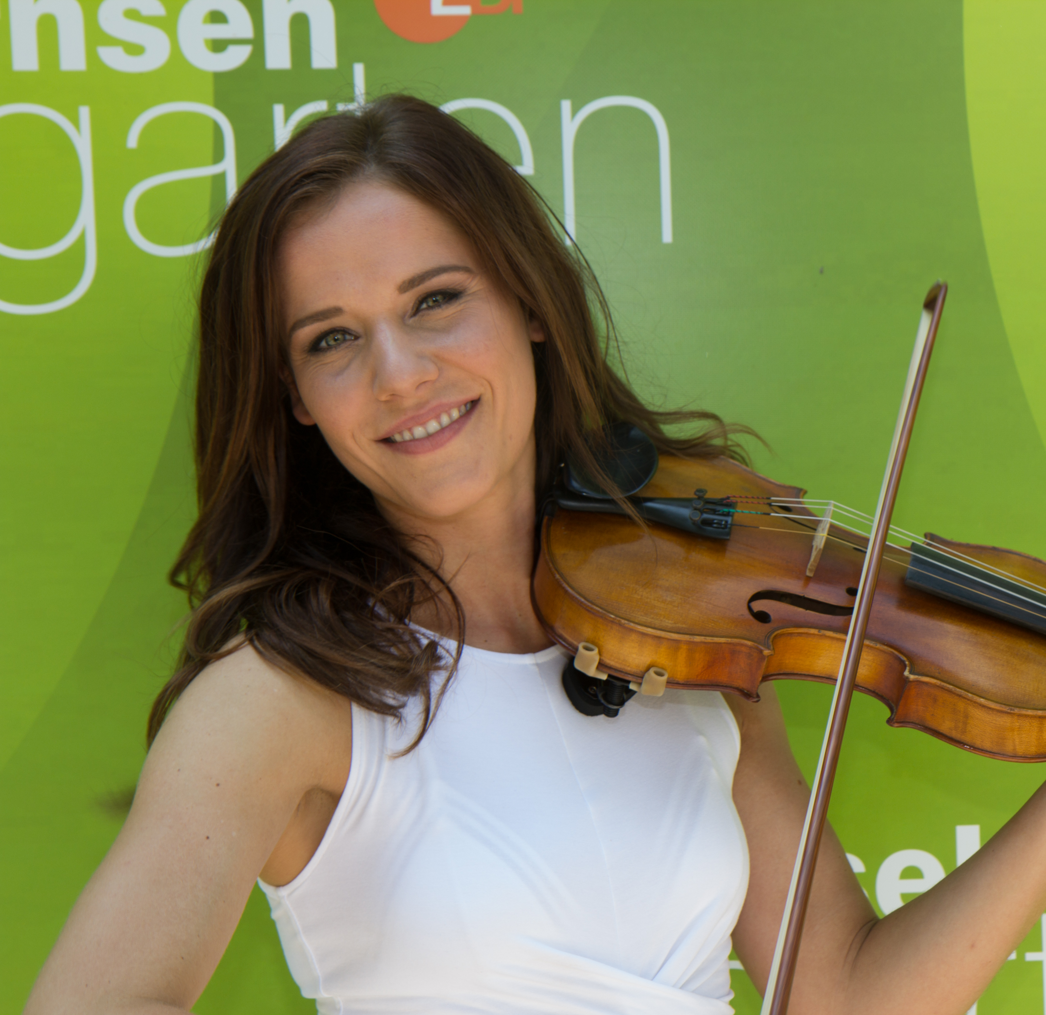 Franziska Wiese als Gast beim ZDF-Fernsehgarten am 15. Juli 2018 in Mainz.